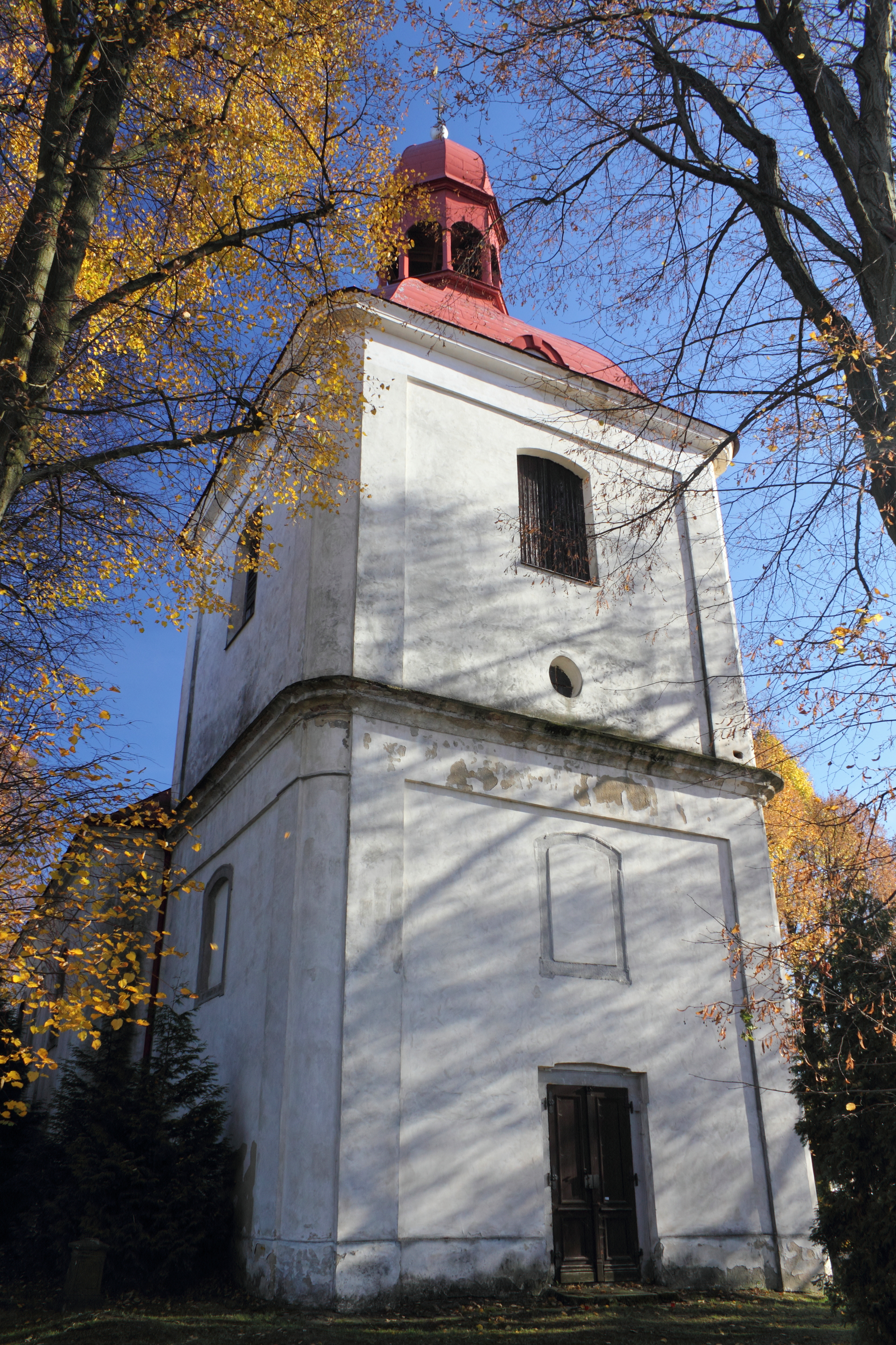 Turnov